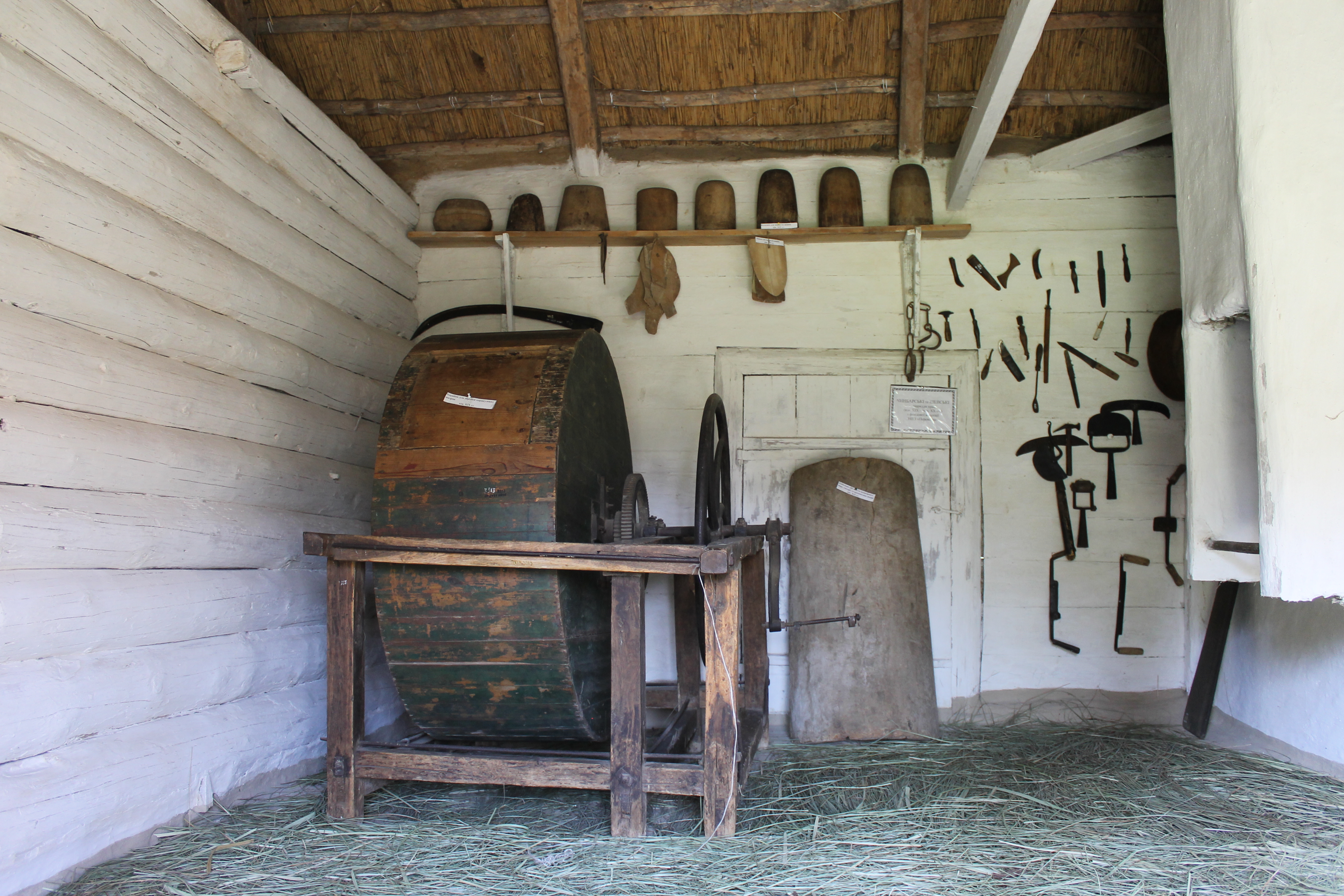 5. Знаряддя праці чинбаря., Двір чинбаря